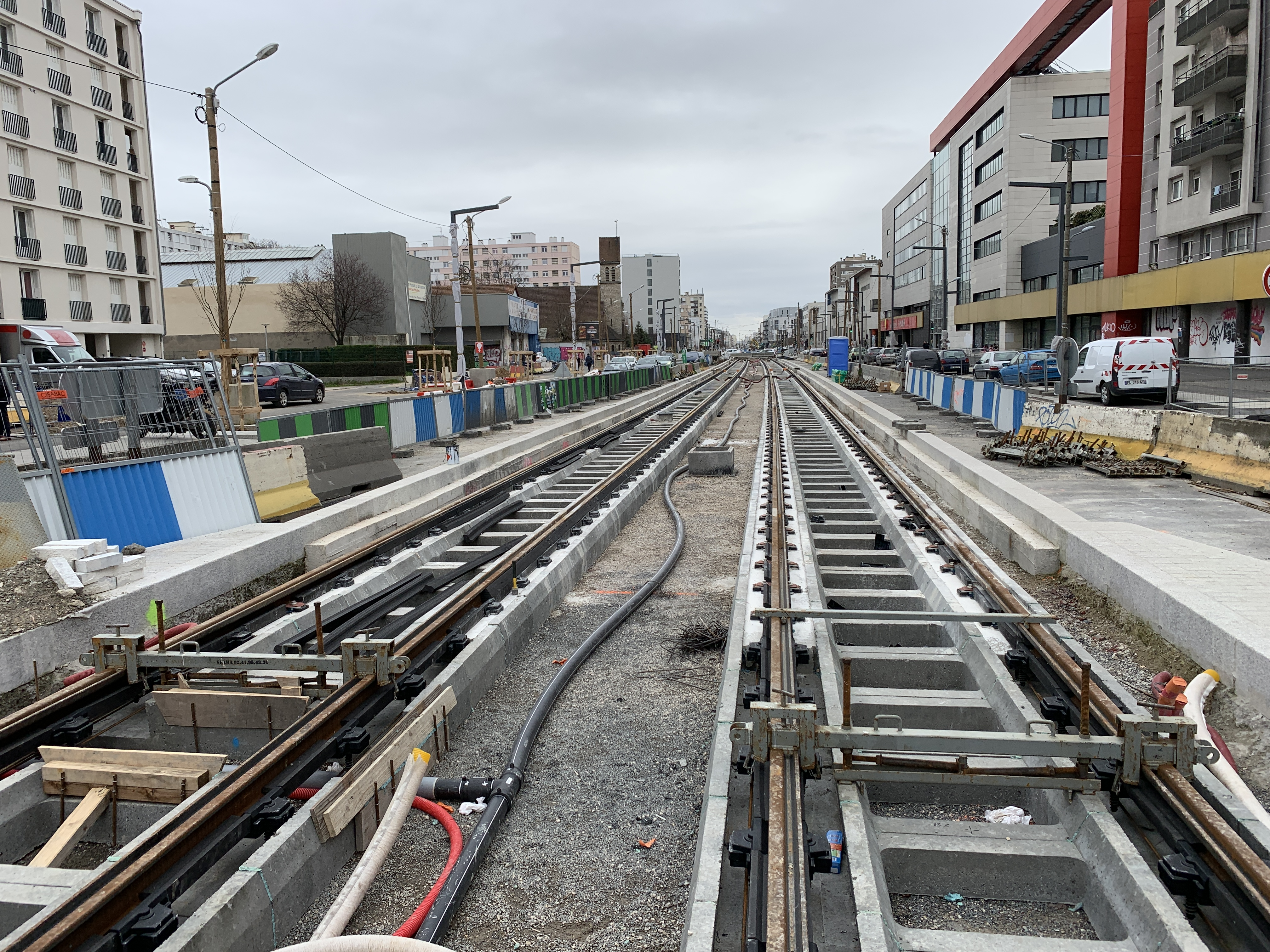 Travaux de la ligne 9 du tramway d'Île-de-France au niveau du boulevard de Stalingrad, Ivry-sur-Seine.